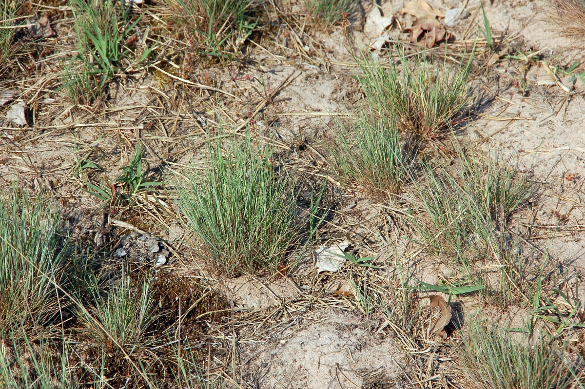 Standortübungsplatz Speyer / Dudenhofen, Rheinland-Pfalz, Deutschland